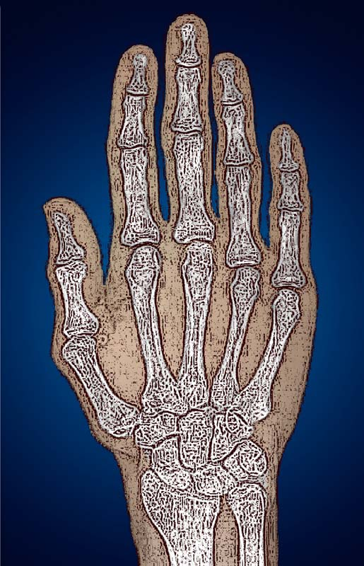 Hand, Main, Anatomic Design, Anatomie der Hand